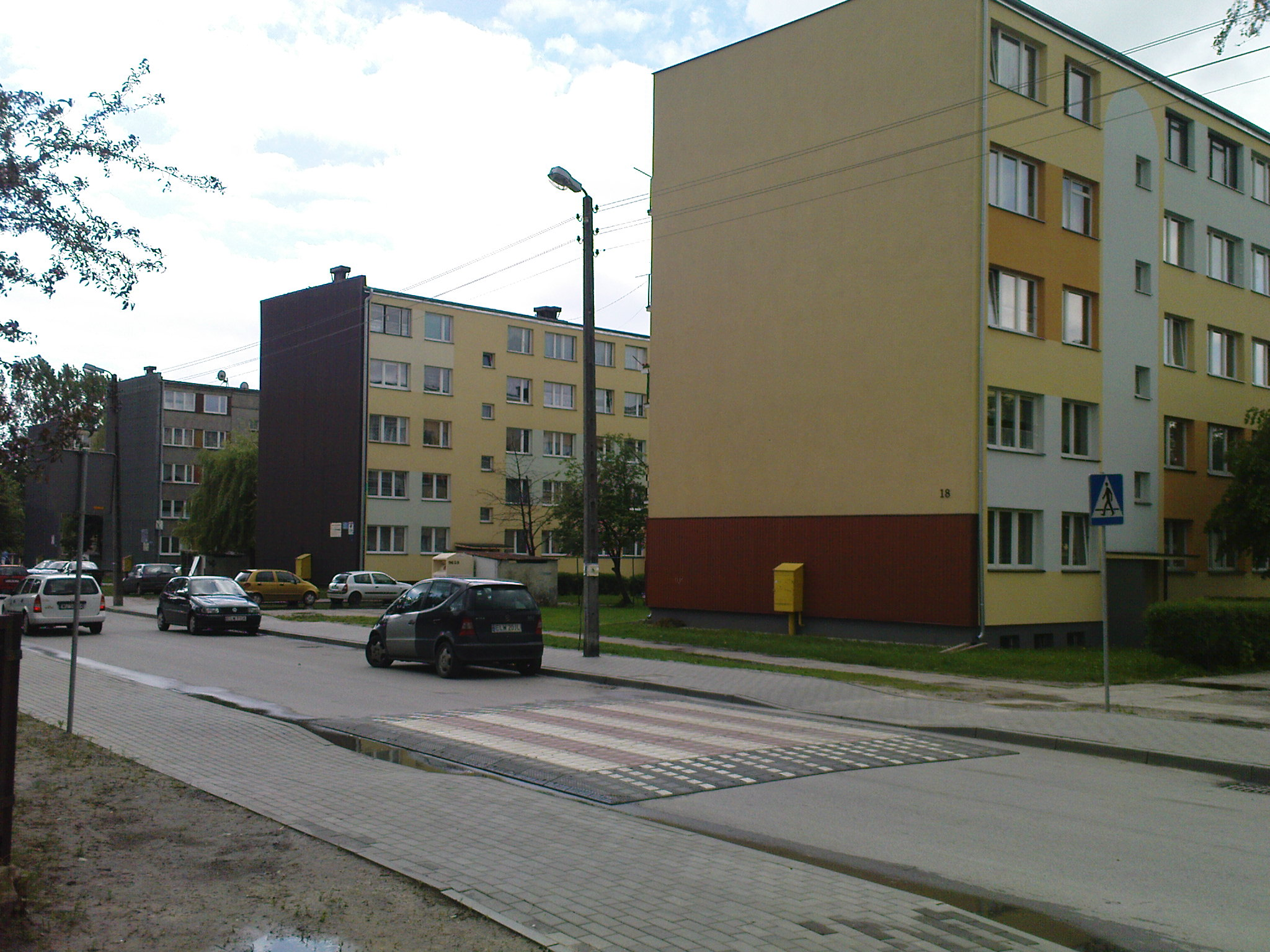 osiedle glowackiego w koluszkach